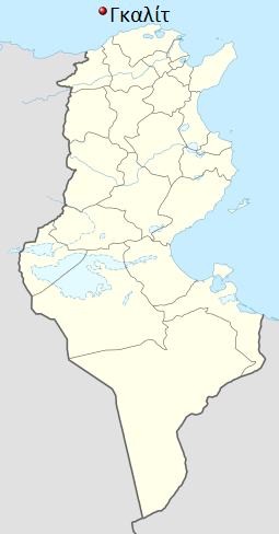 Τοποθεσία των νησιών Γκαλίτ